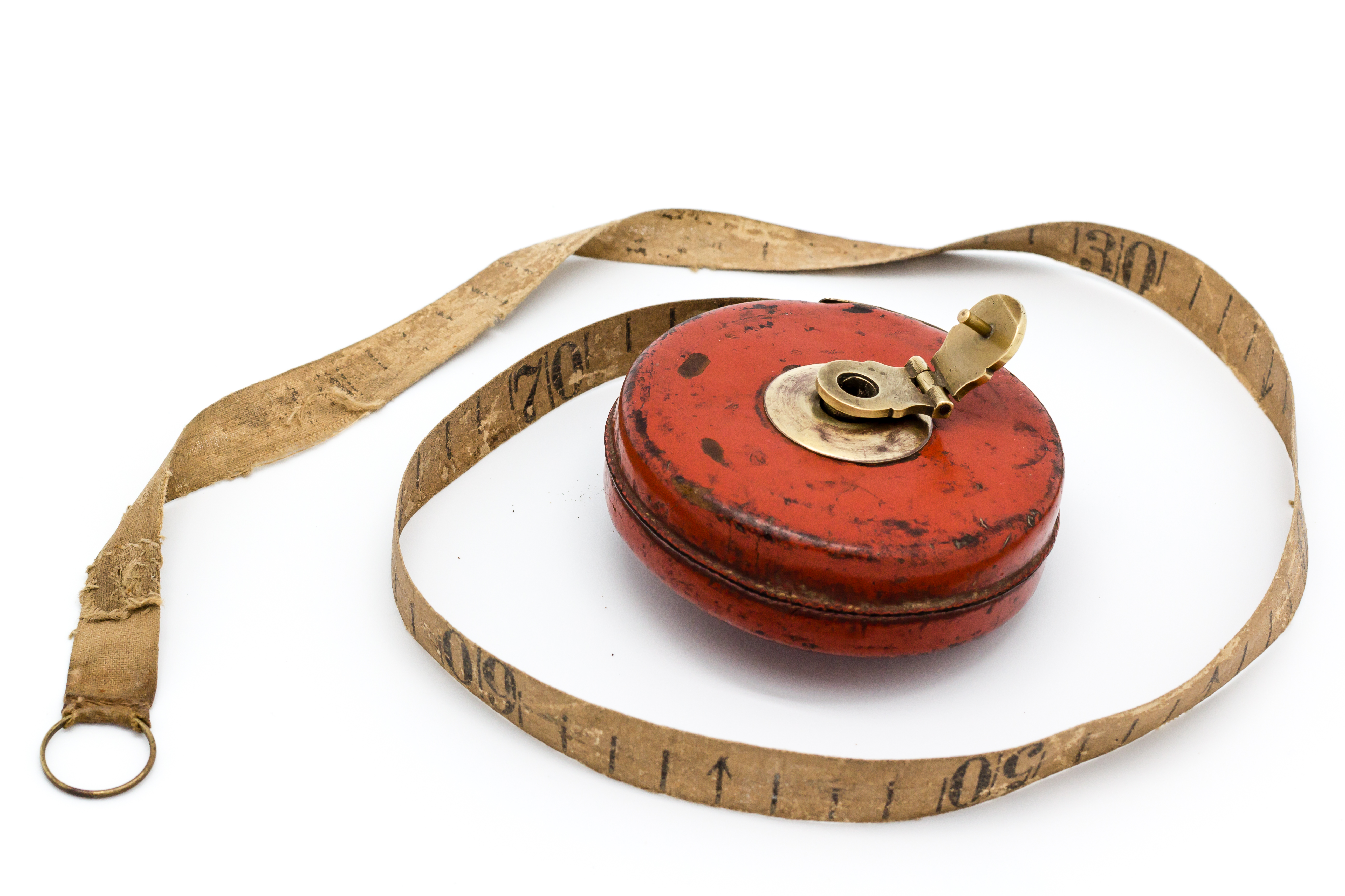 Chevillère décamétrique. Ruban en toile, boîtier couvert de cuir, anneau et manivelle en laiton. Le ruban est gradué en centimètres avec un échelon au mètre, au décimètre et au demi-décimètre. La manivelle pliante permet d'enrouler le ruban dans le boîtier.